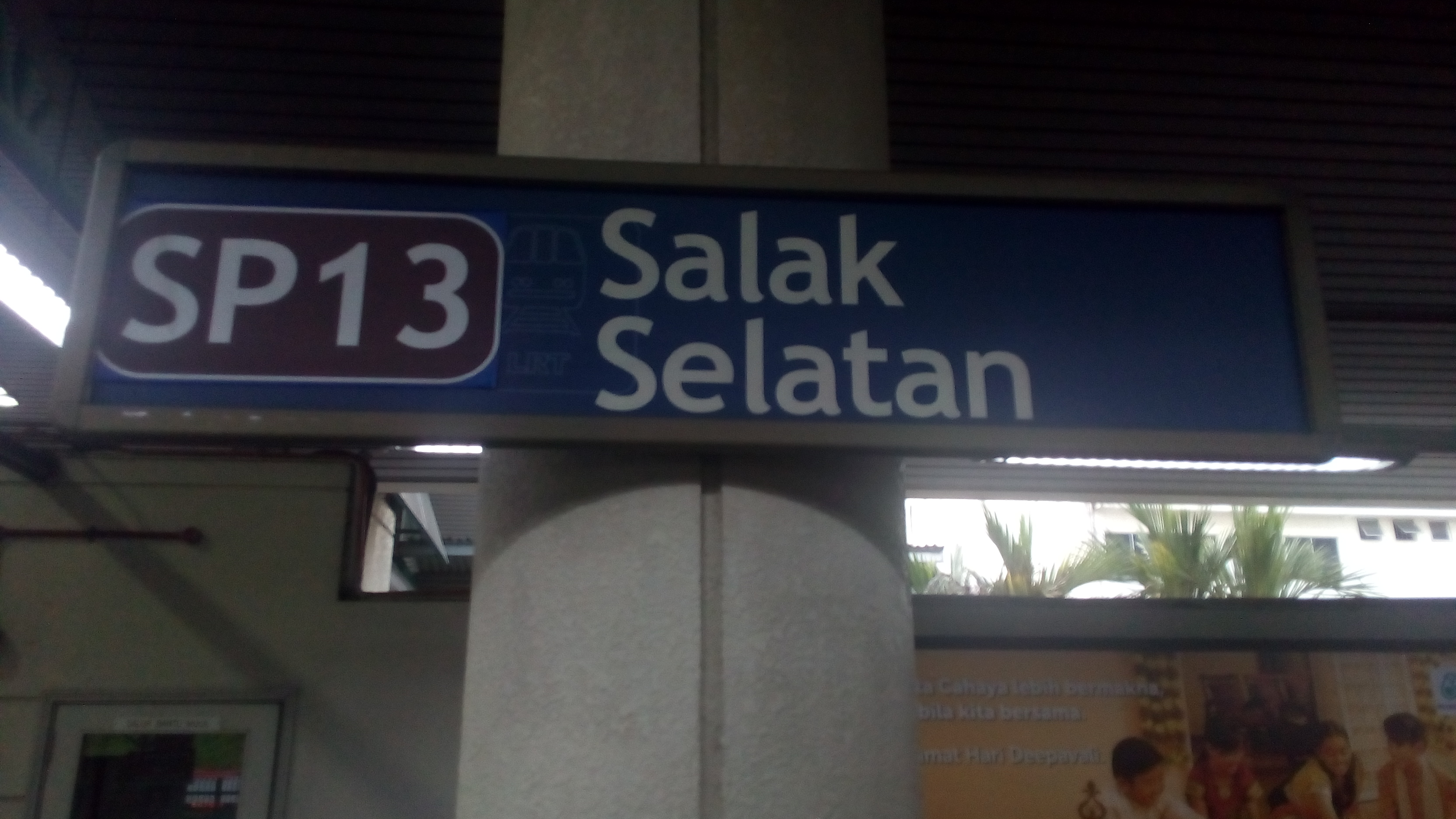 沙叻秀新村站站牌